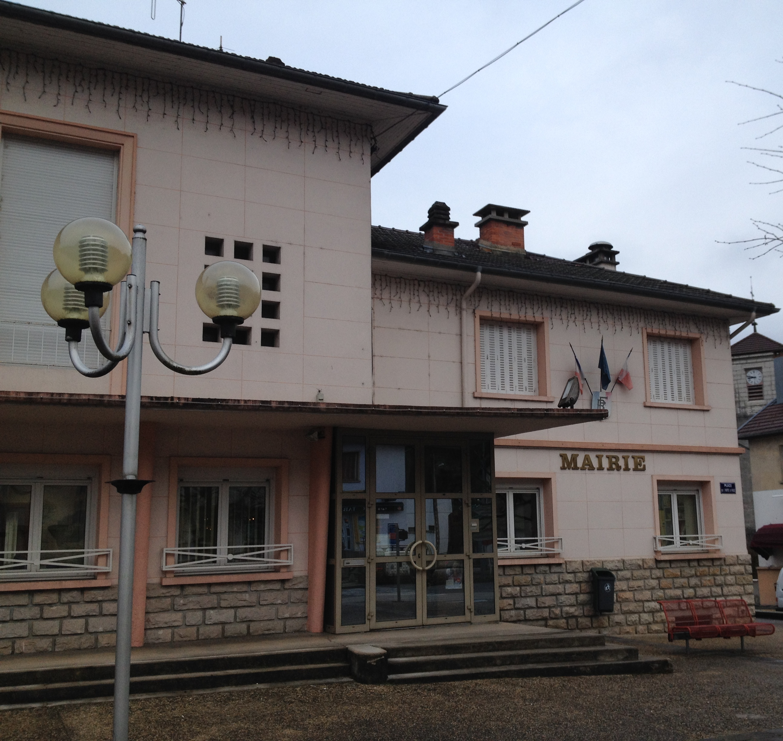 Mairie de Dortan.